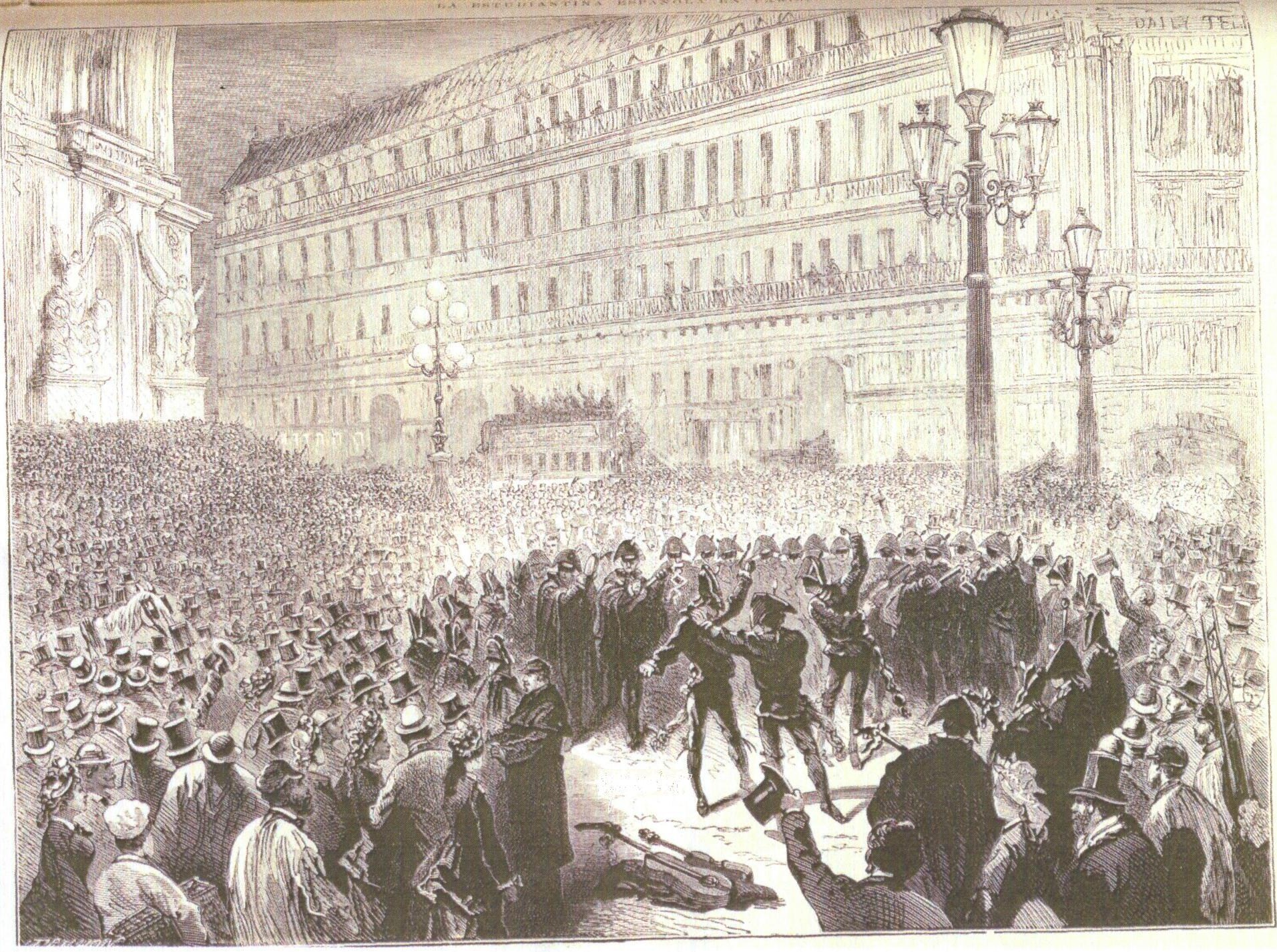 La troupe étudiante espagnole de l'Estudiantina Espagnola le jeudi 7 mars 1878 place de l'Opéra à Paris.